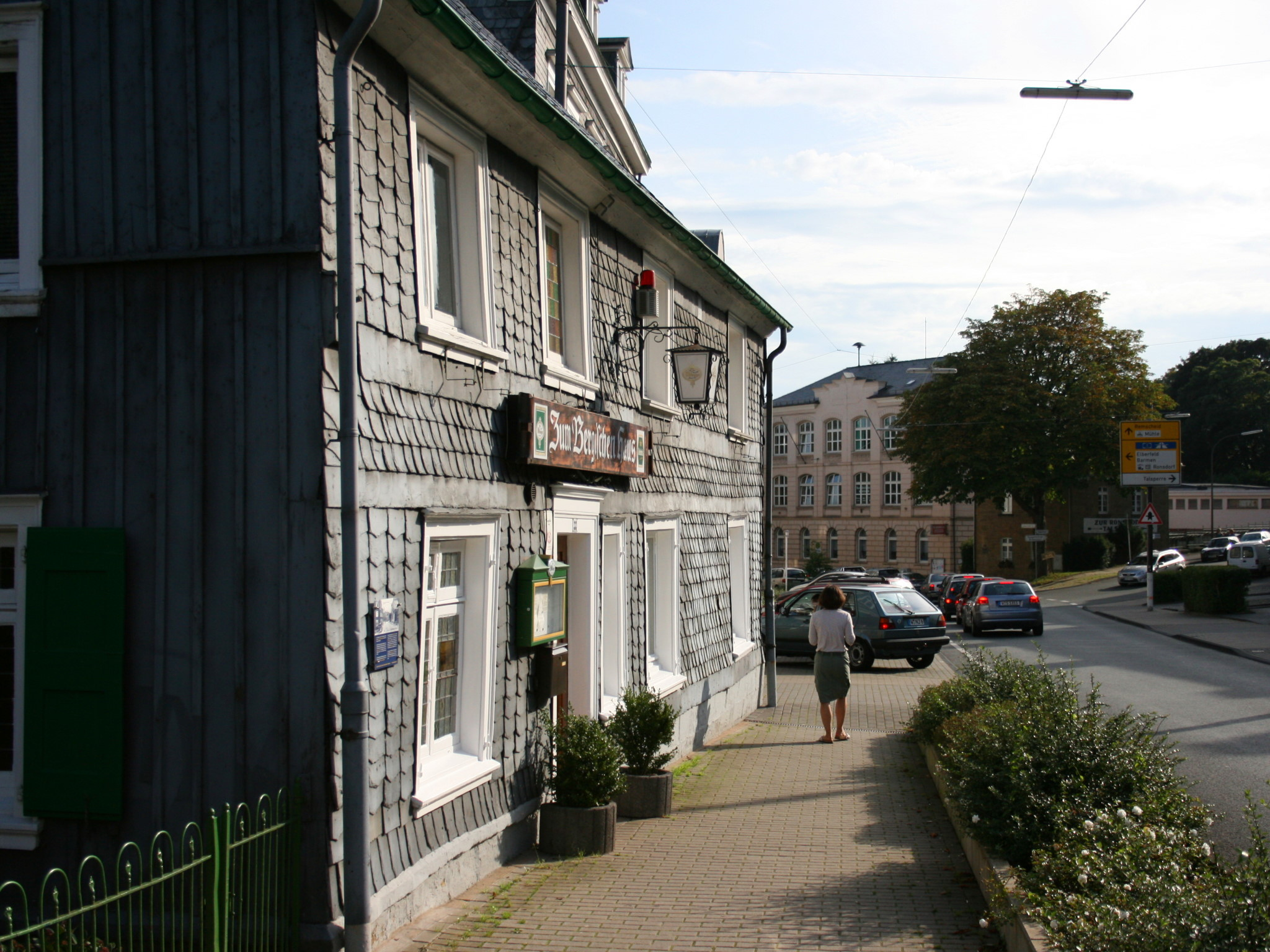 Wuppertal-Ronsdorf: Restaurant Zum Bergischen Haus